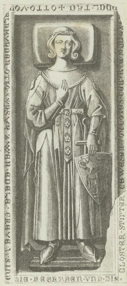 Bildunterschrift:Grabstein des Grafen Otto III. und Otto V. von Orlamuende / zu Himmelkron / gest. 13. Mai 1285 / gest. 1315